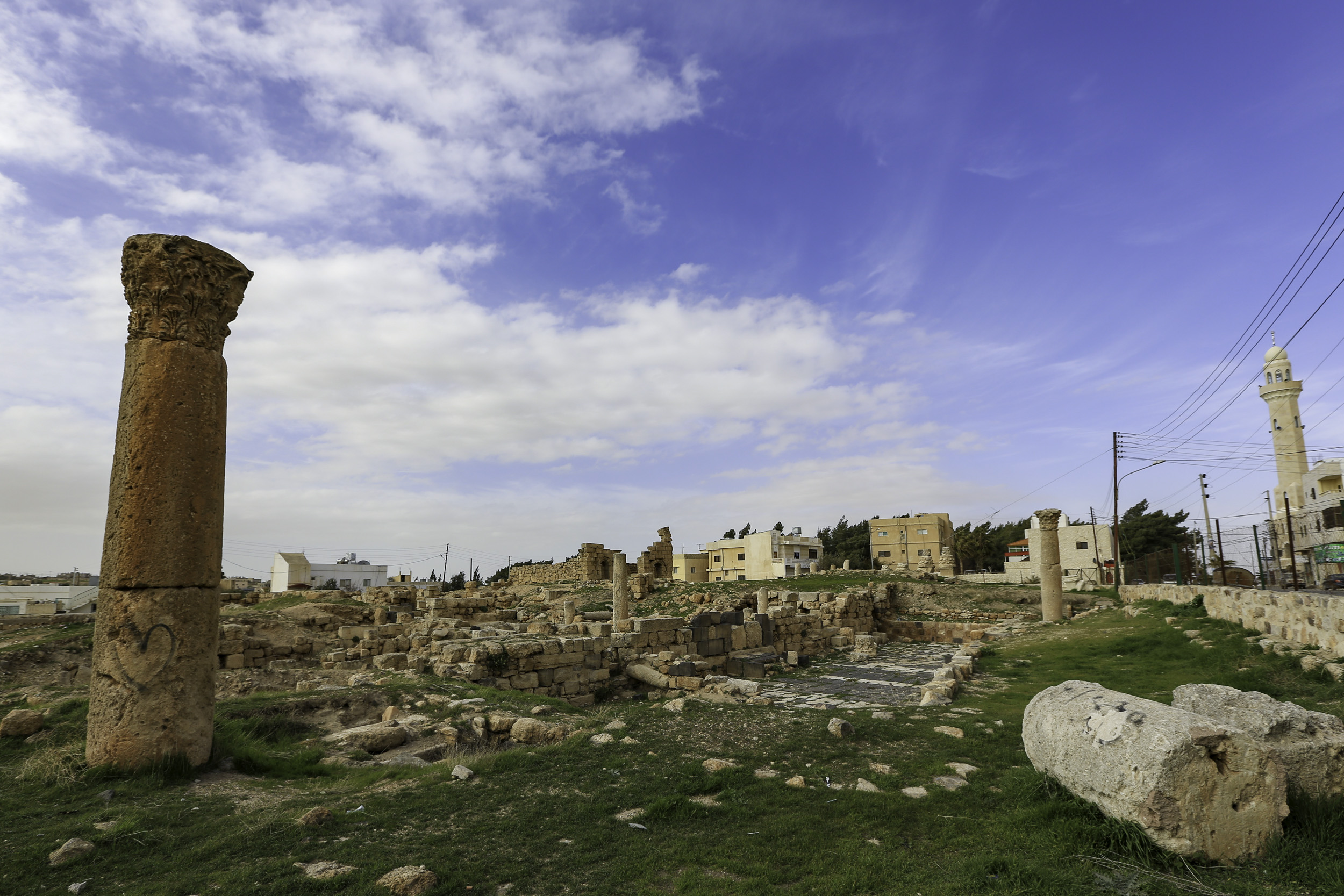 Rabba